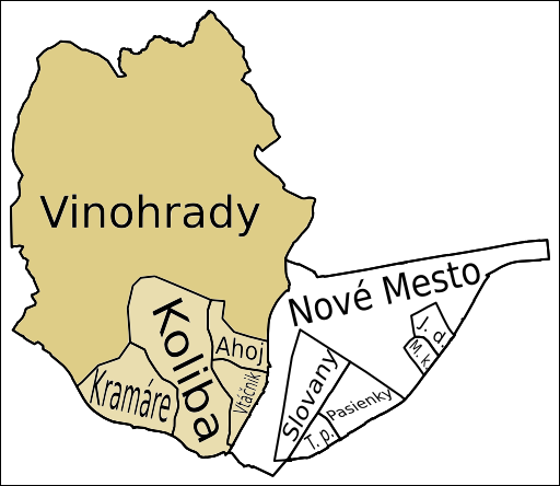 Vinohrady, Nové Mesto, Bratislava